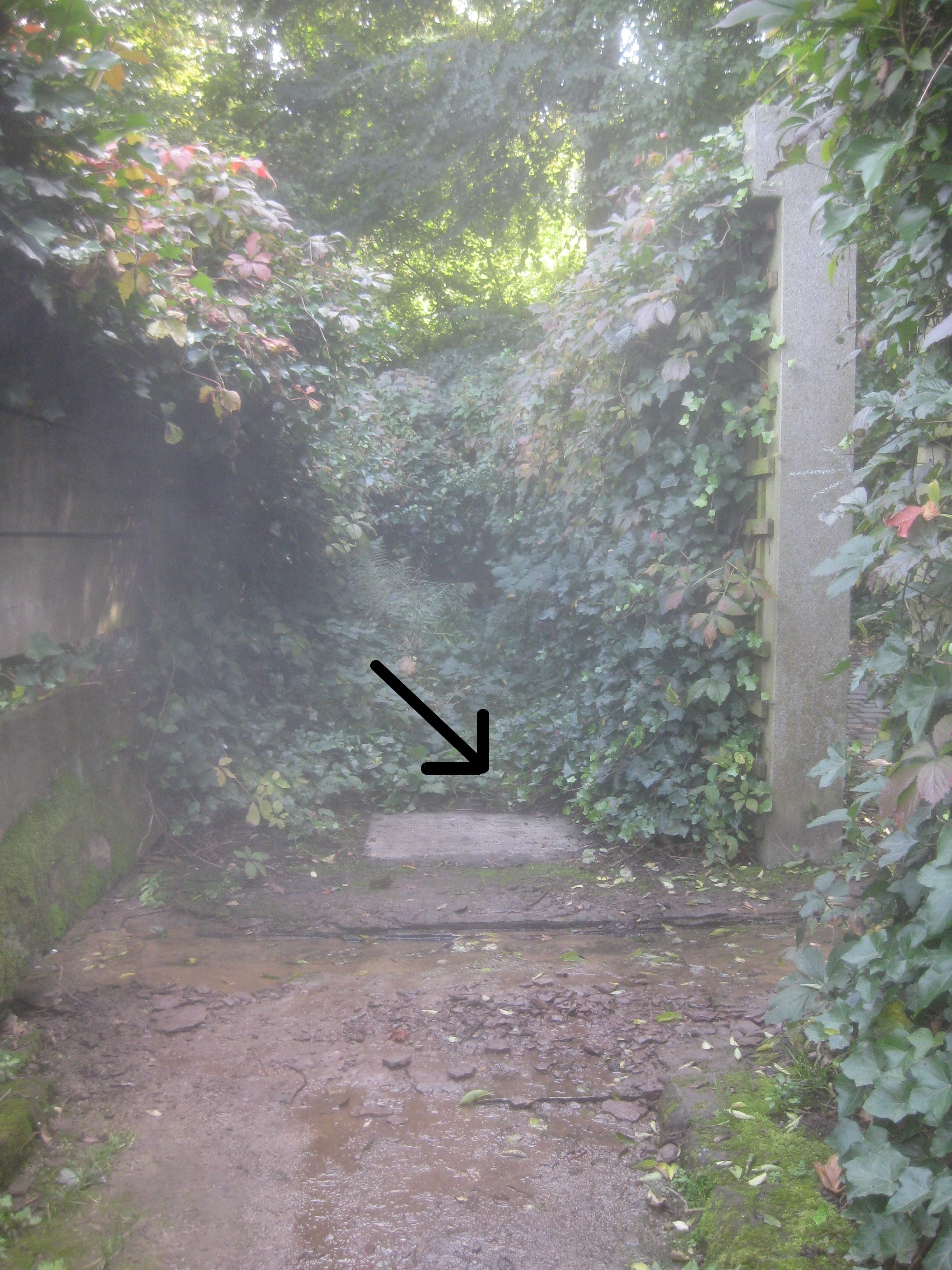 Gedenktafel im Grottenloch (Memorial Garden), Brunneninstallation von Michael Singer auf dem Wartberggelände in Stuttgart.